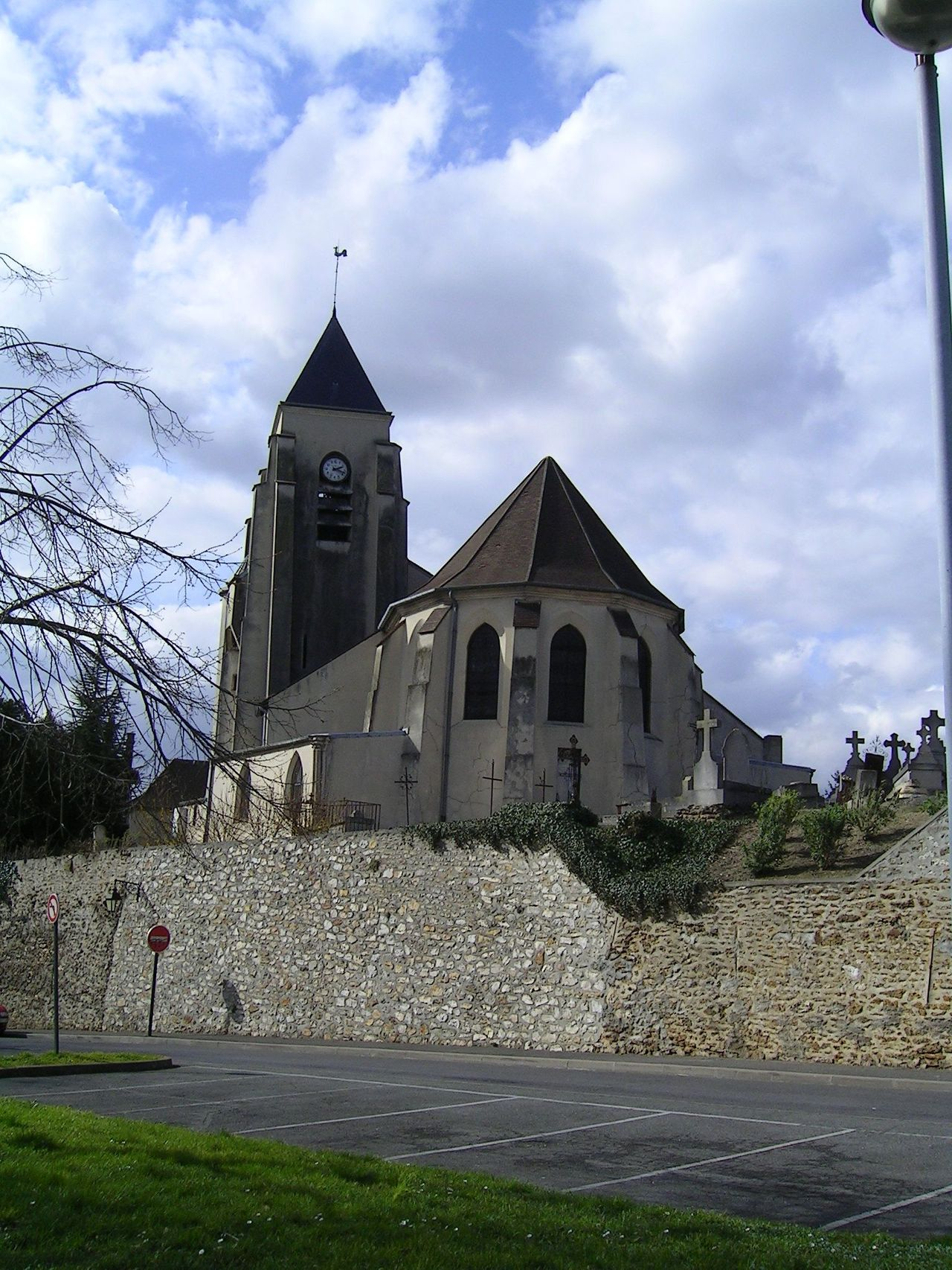 Église Saint-André et son cimetière Photo personnelle (own work) de Marianna